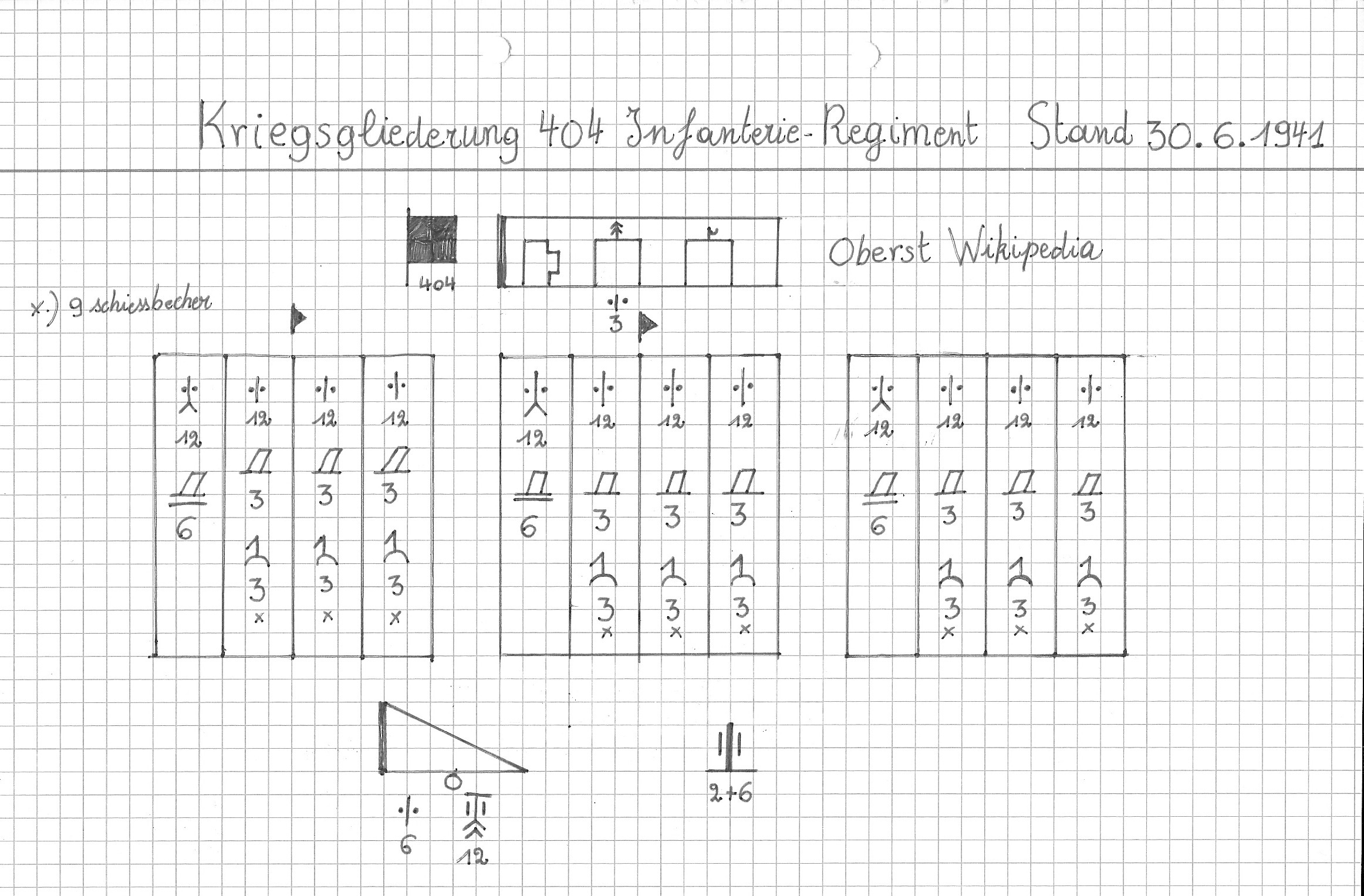 KriegsGliederung inf rgt 30 jun 1941